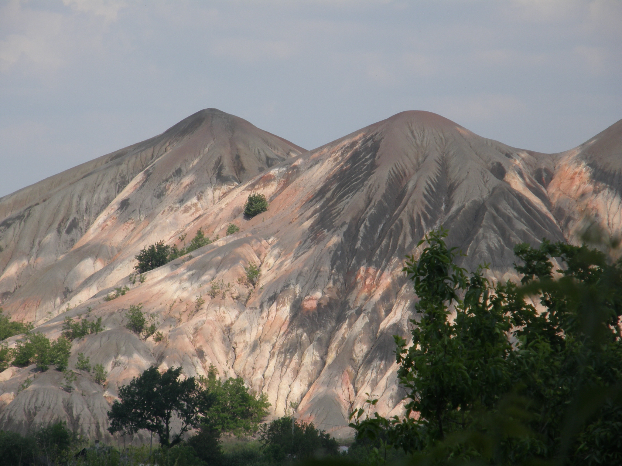 Будённовский район Донецка